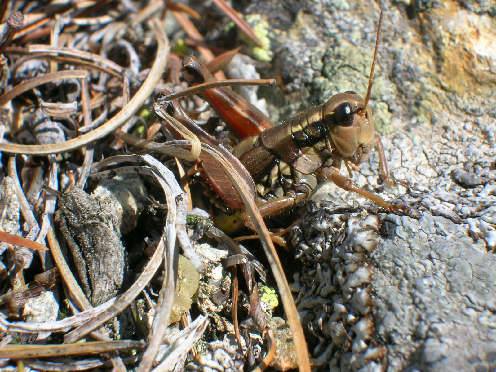 Gewöhnliche Gebirgsschrecke, Podisma pedestris, Eier legend (2000 m ü M, Alpen, Engadin)